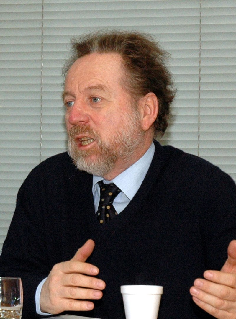 El historiador chileno Joaquín Fermandois durante la conferencia «Historiadores analizan el mayo francés en su cuadragésimo aniversario» en la Universidad Católica